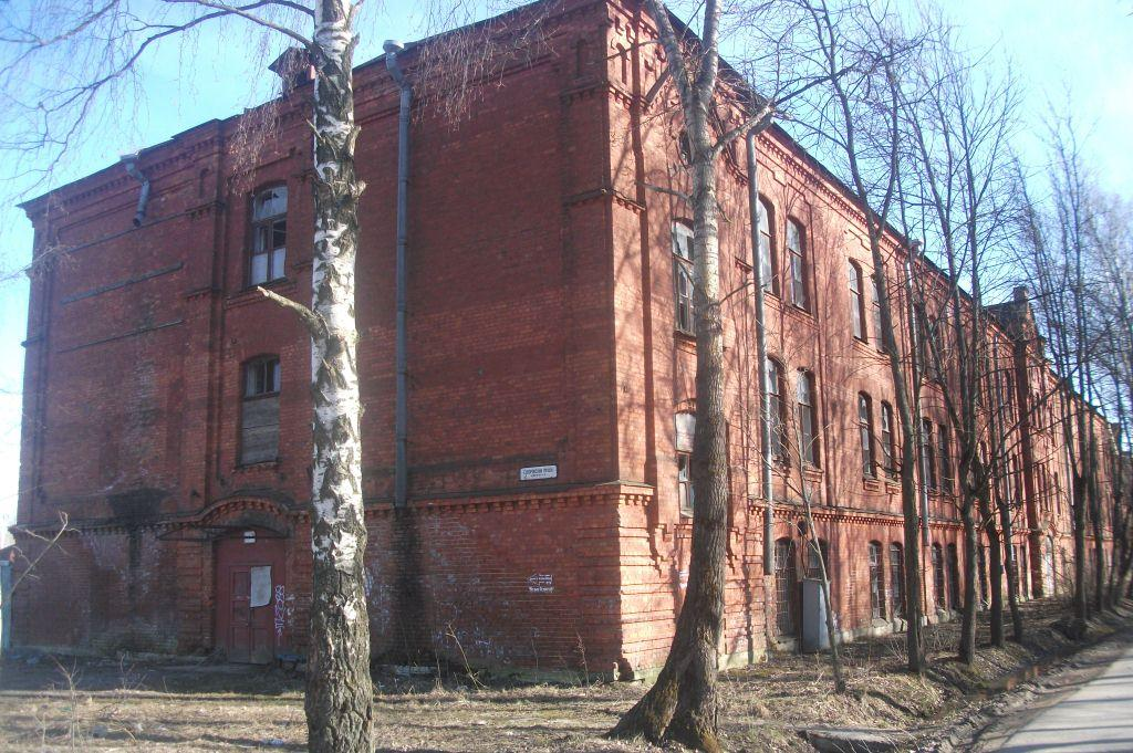 Бывшие казармы Каспийского полка, современное состояние